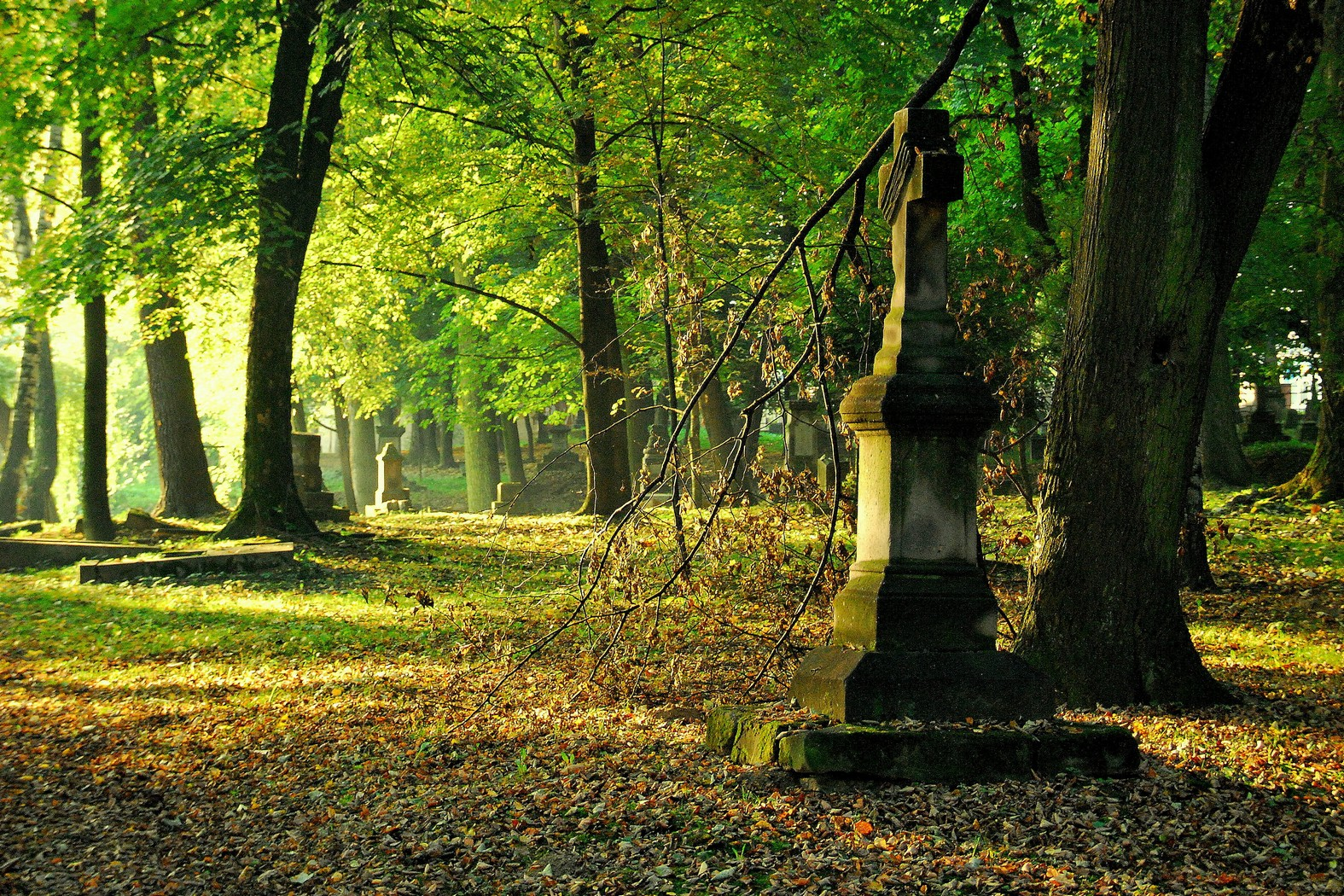 cmentarz rzym.-kat., tzw. Stary Krosno, ul. Krakowska, Krosno